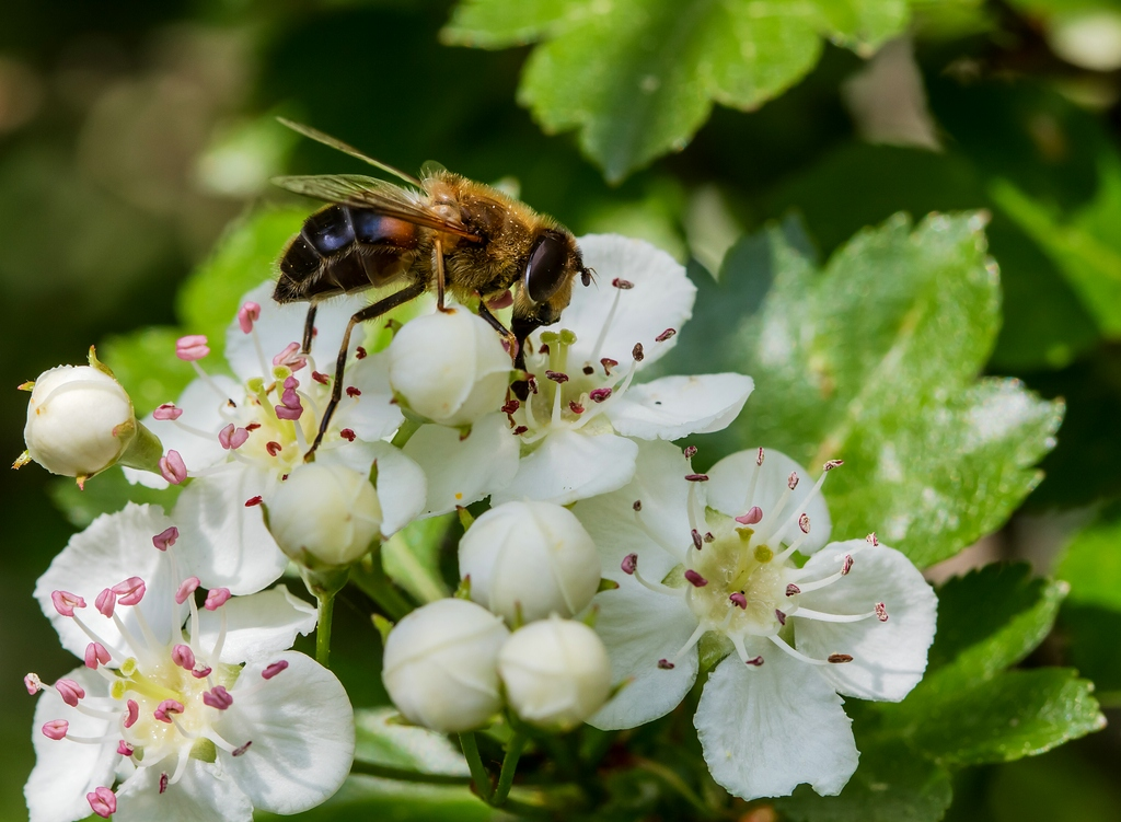 Sachsen, Waldrand, Südseite: Zweigriffeliger Weißdorn